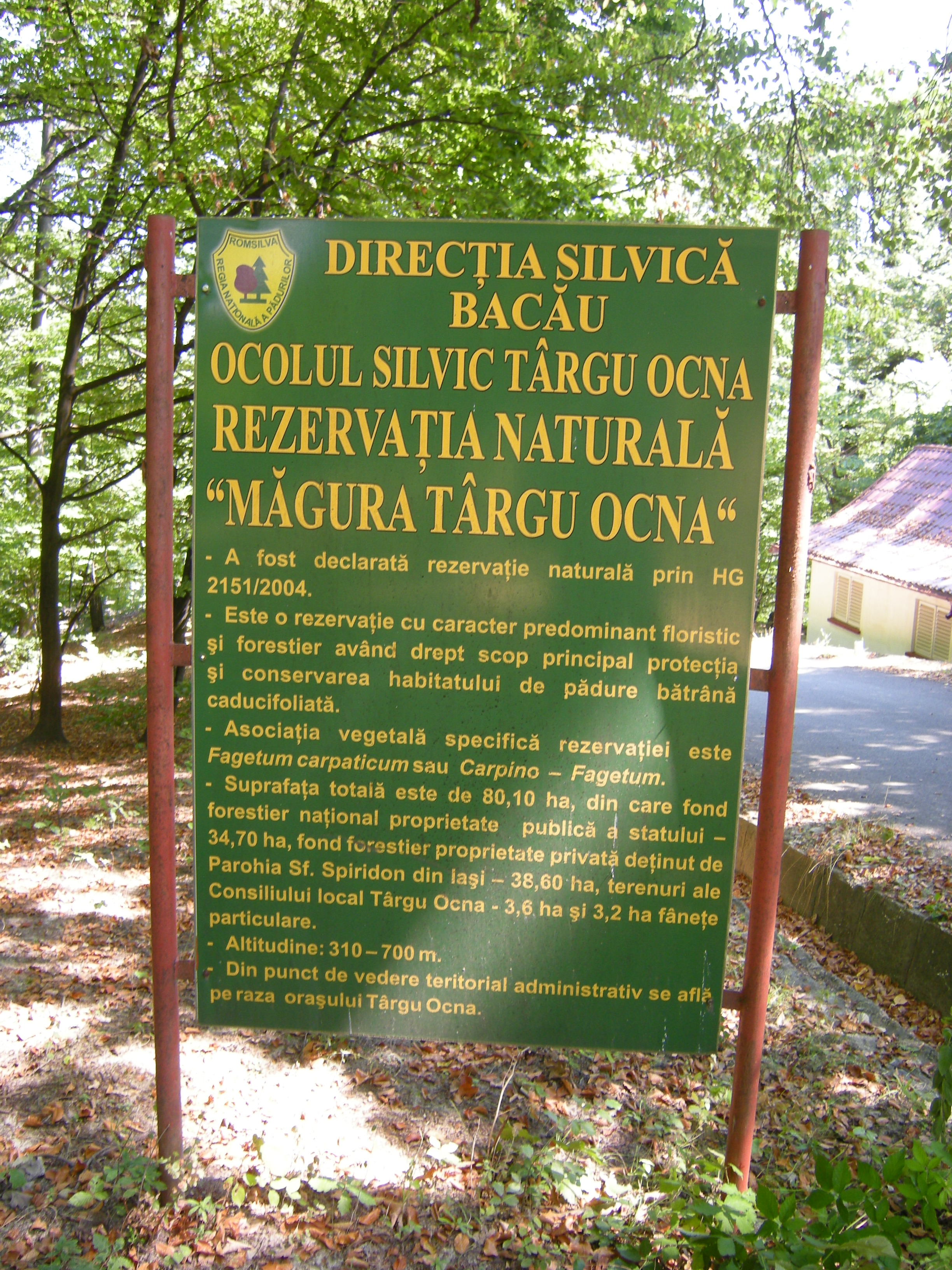 Placa indicatoare a rezervației „Măgura Târgu Ocnei”.